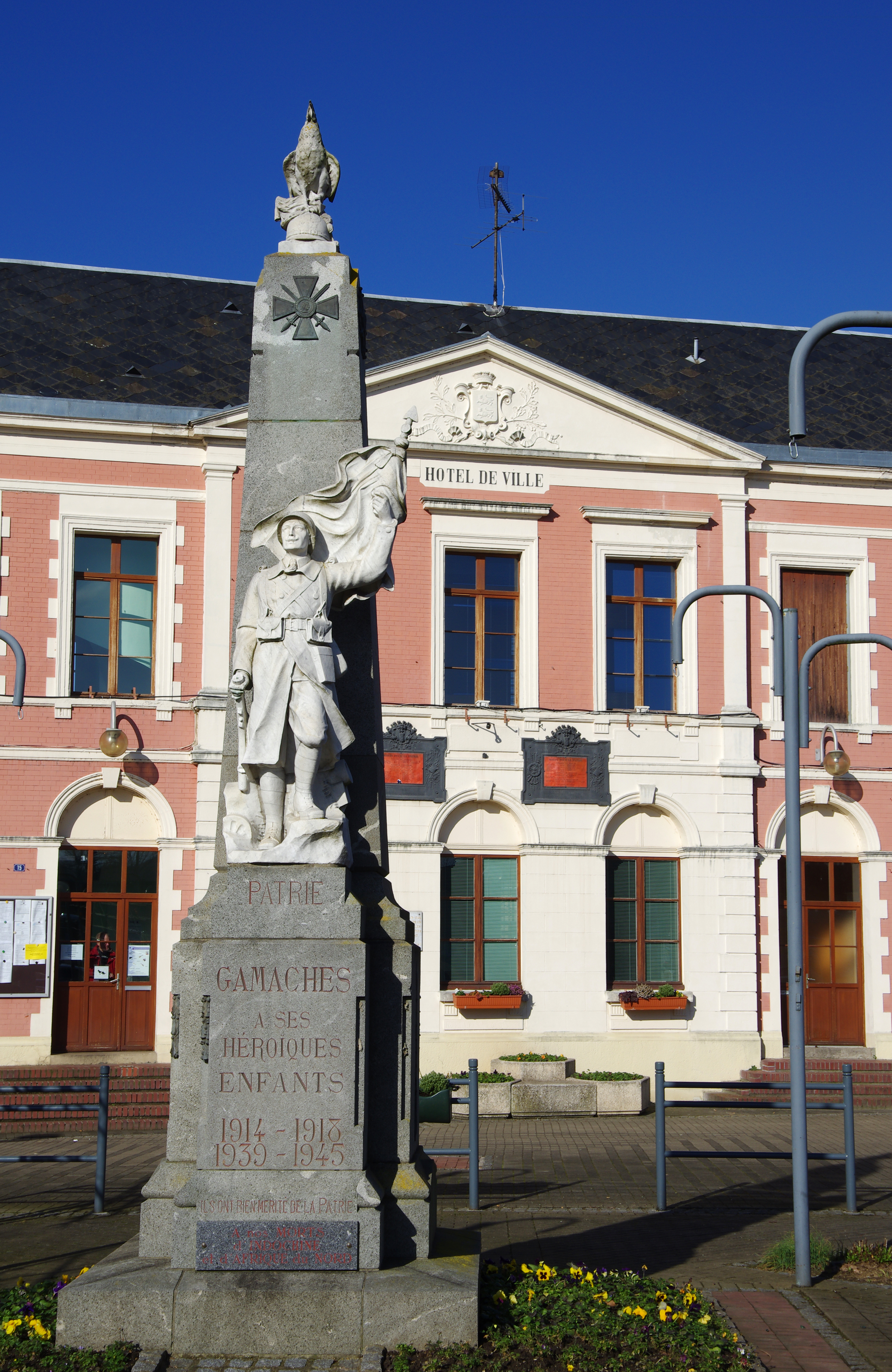 Gamaches (Somme, France) - Le monument-aux-morts se dresse devant l'hôtel-de-ville.